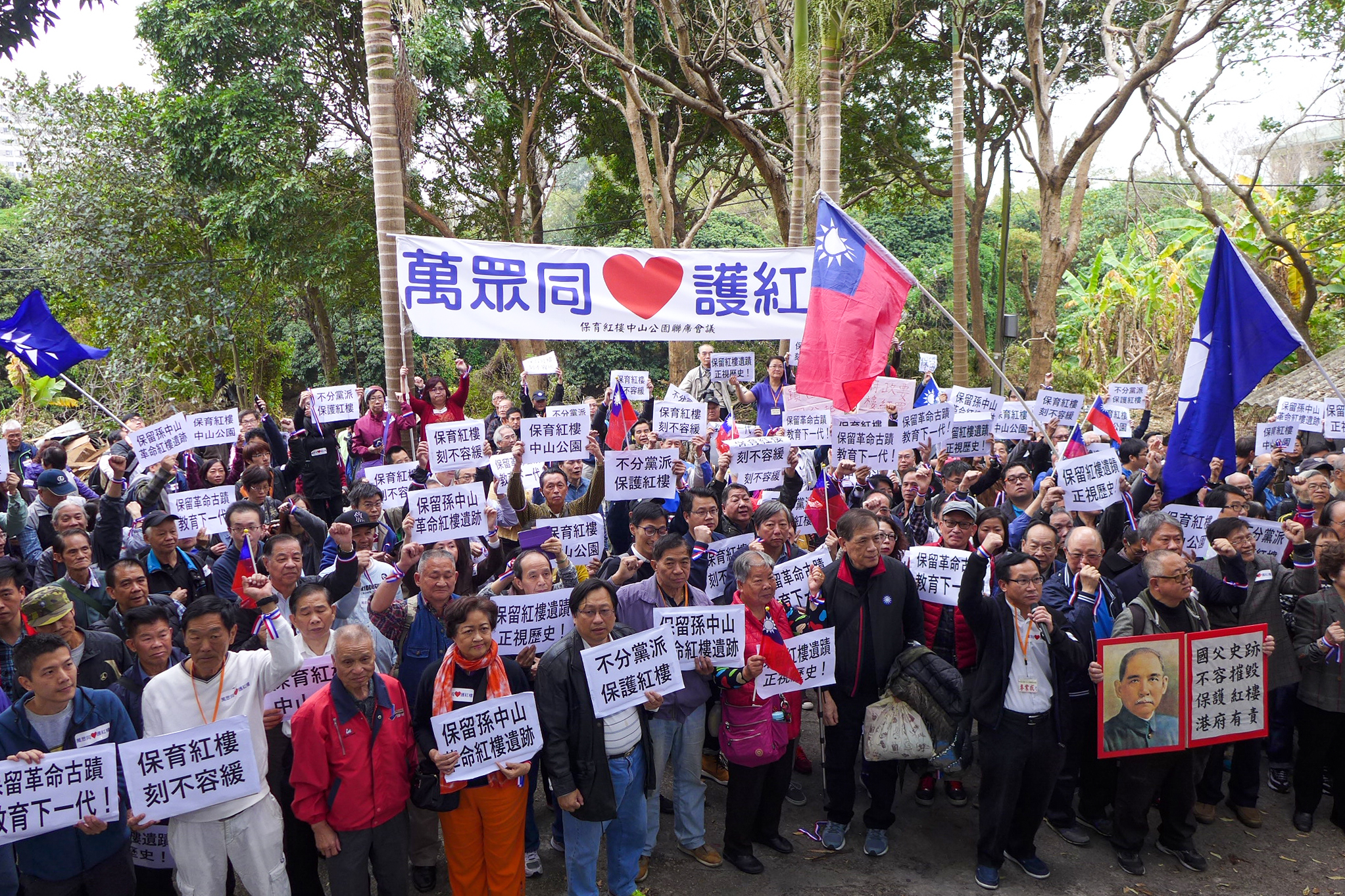 Save Hung Lau protest